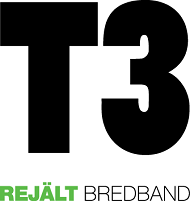 Telecom3 Sverige AB logo